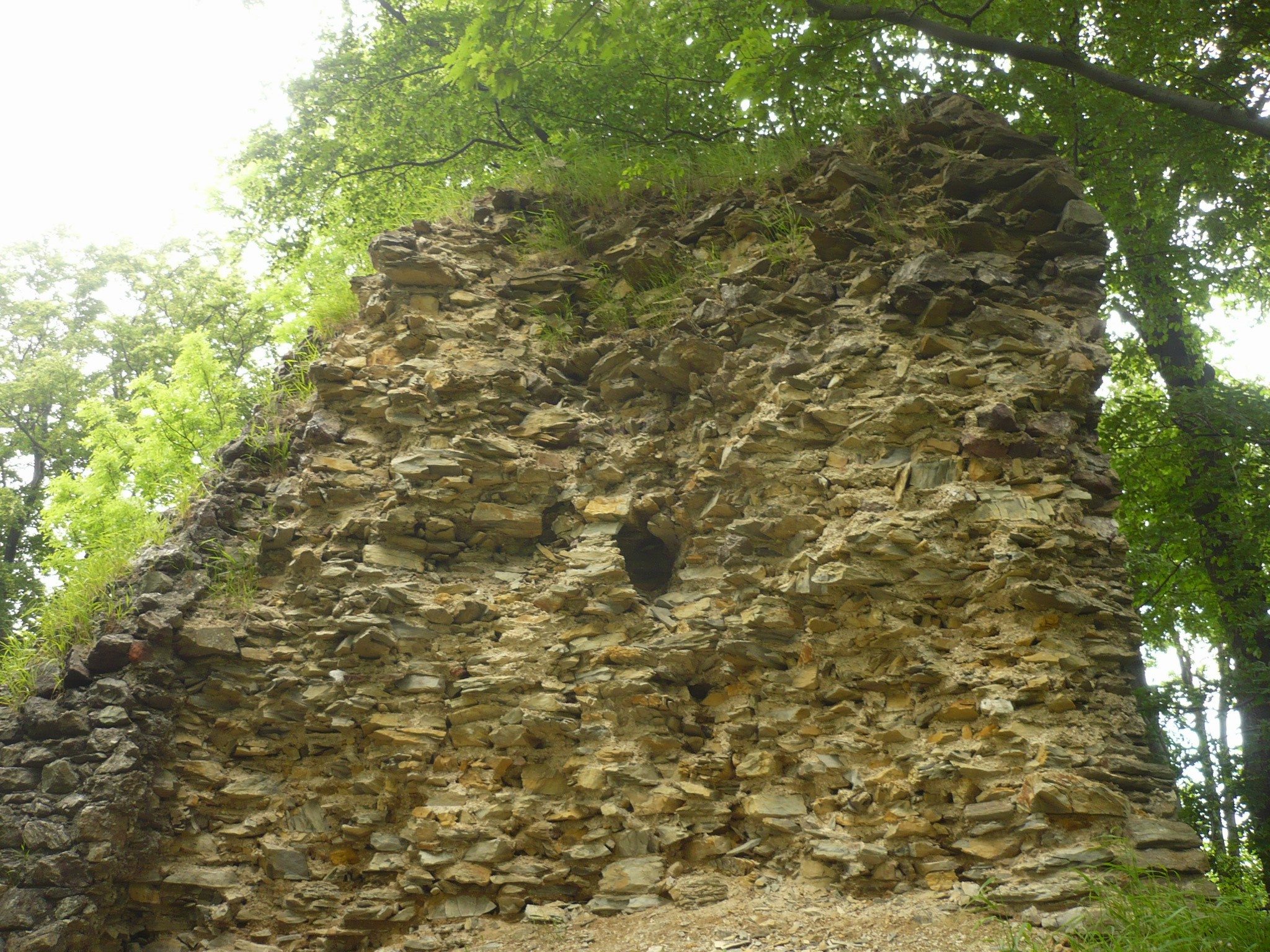 Zamek Homole